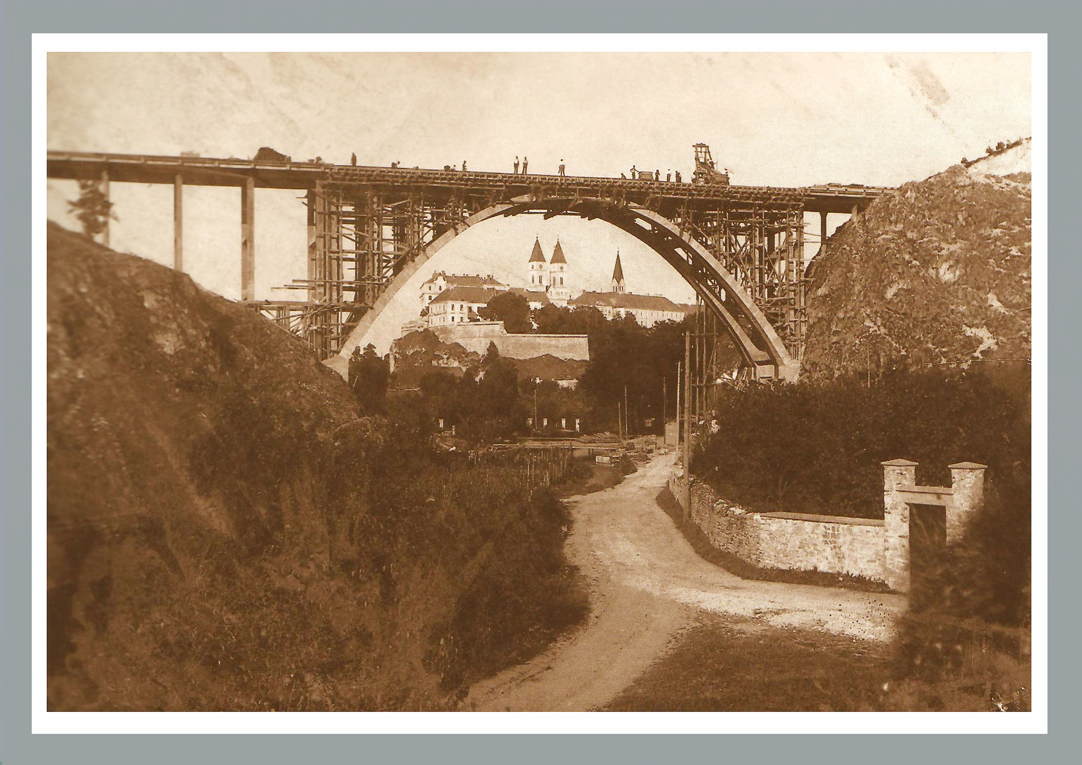 A veszprémi völgyhíd befejező munkálatai